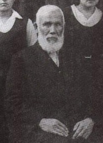 Abdürreşit İbrahim Efendi (1857-1944) ve çocukları